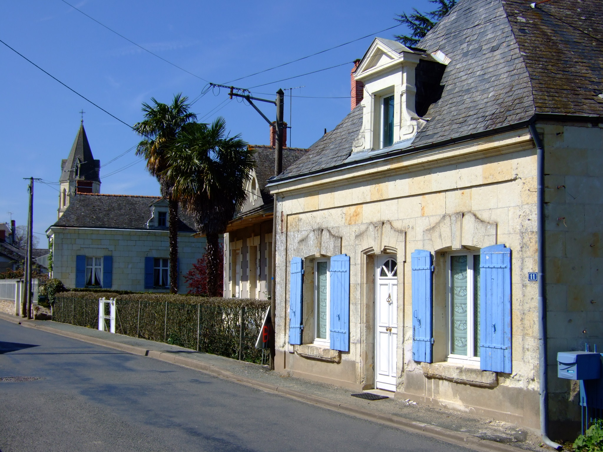 Le village de Saint-Rémy-la-Varenne